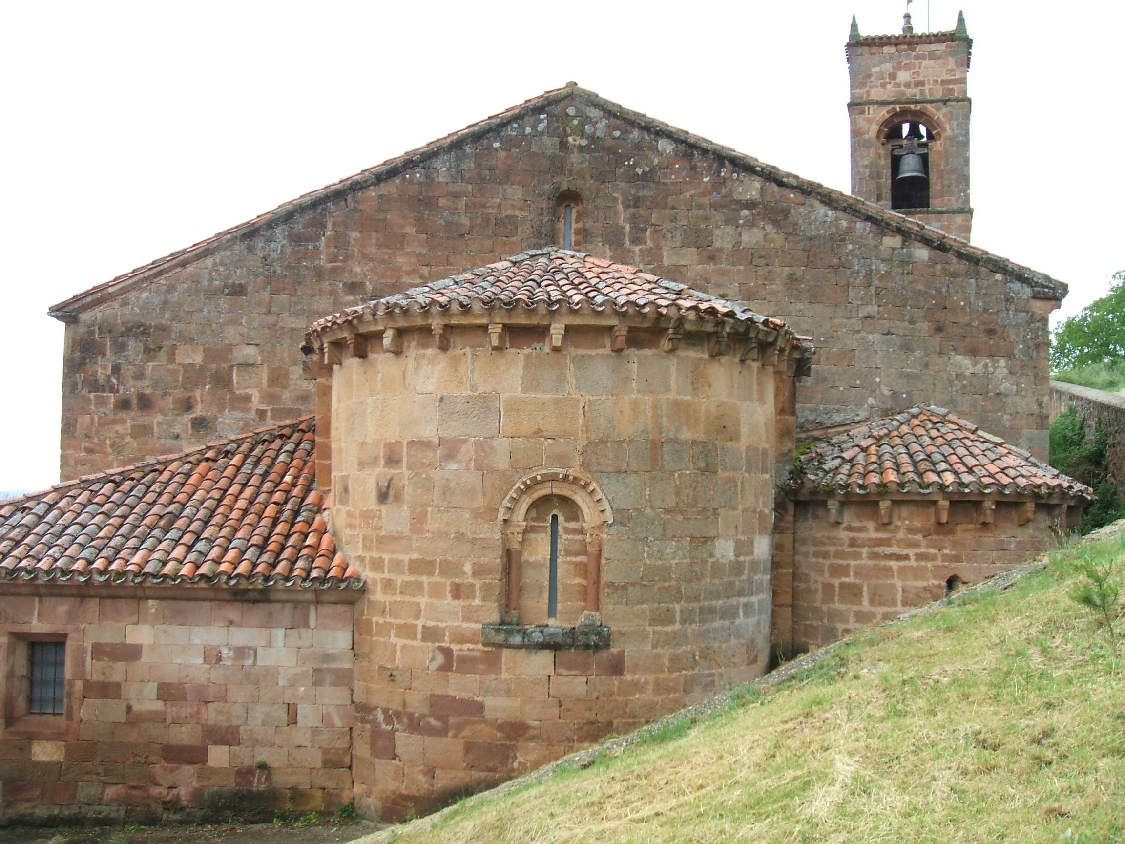 Iglesia de San Millán (San Millán de Lara, Burgos)